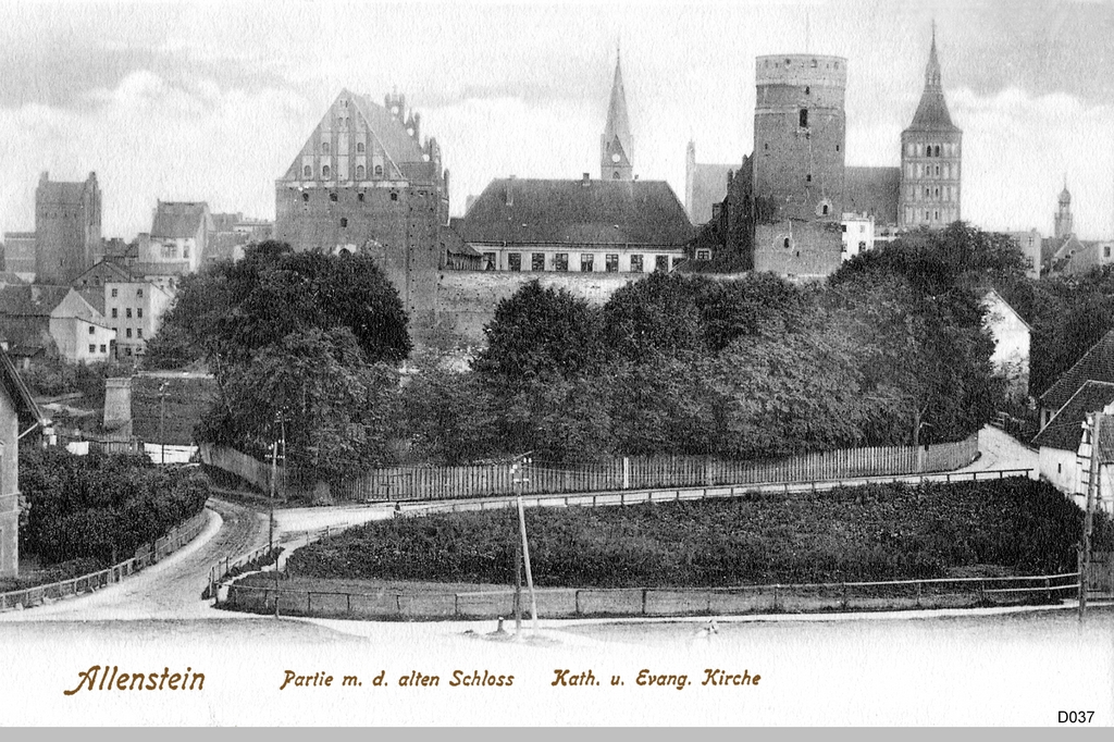 Allenstein